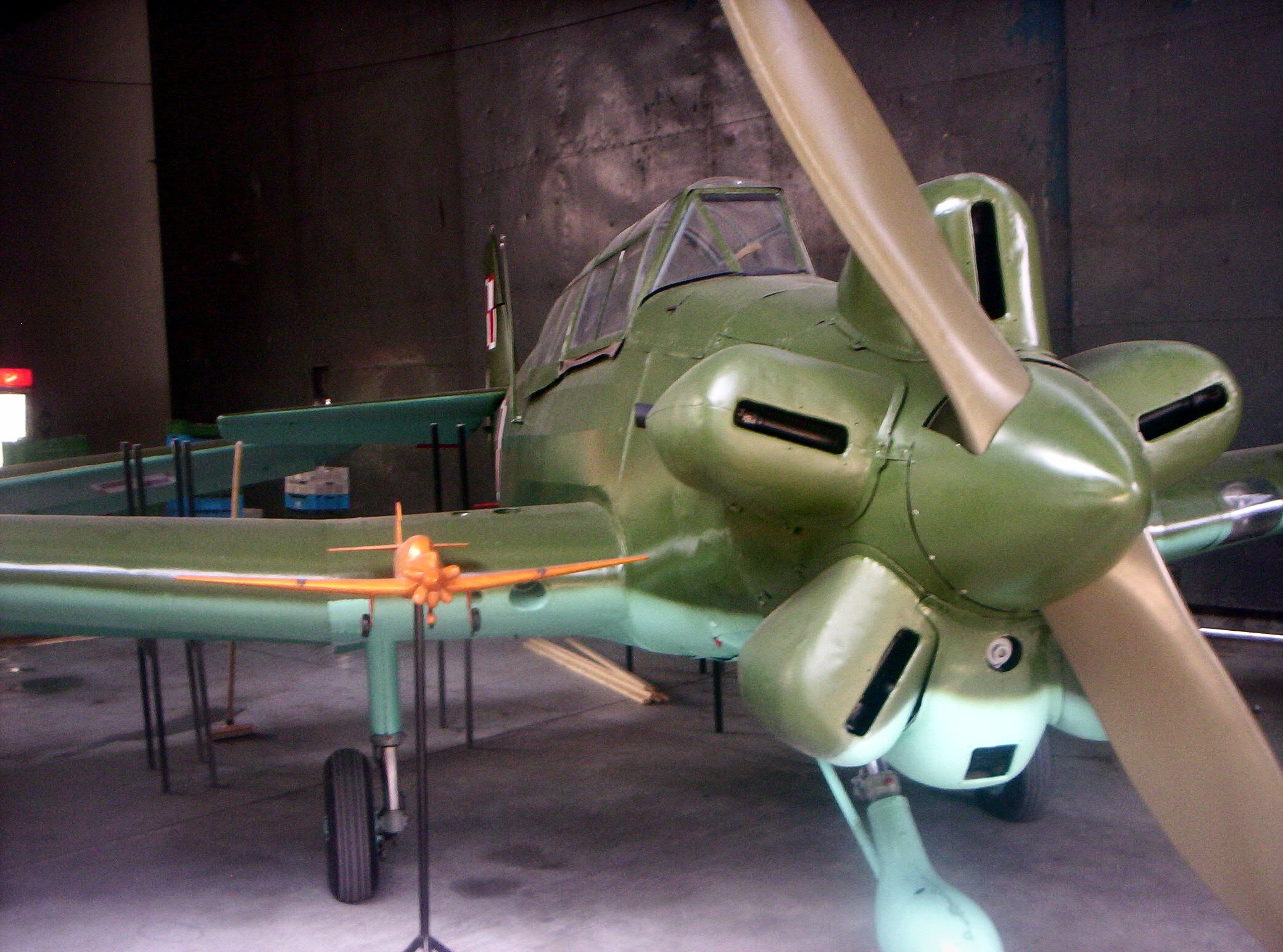 LWD Junak-3, Polish Aviation Museum in Kraków